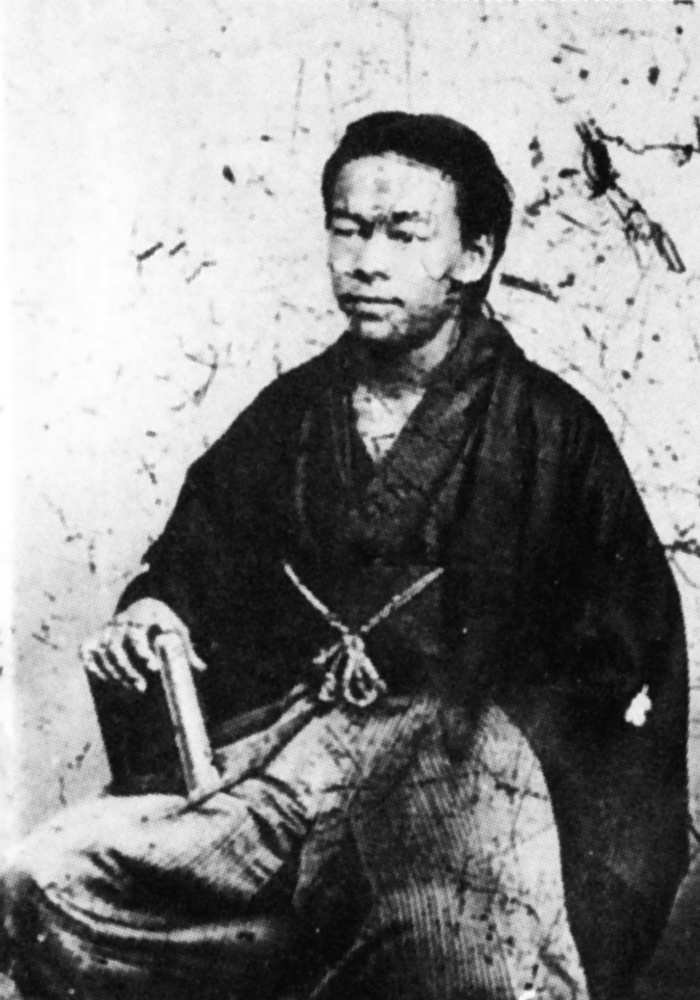 Yamamoto Fotografie